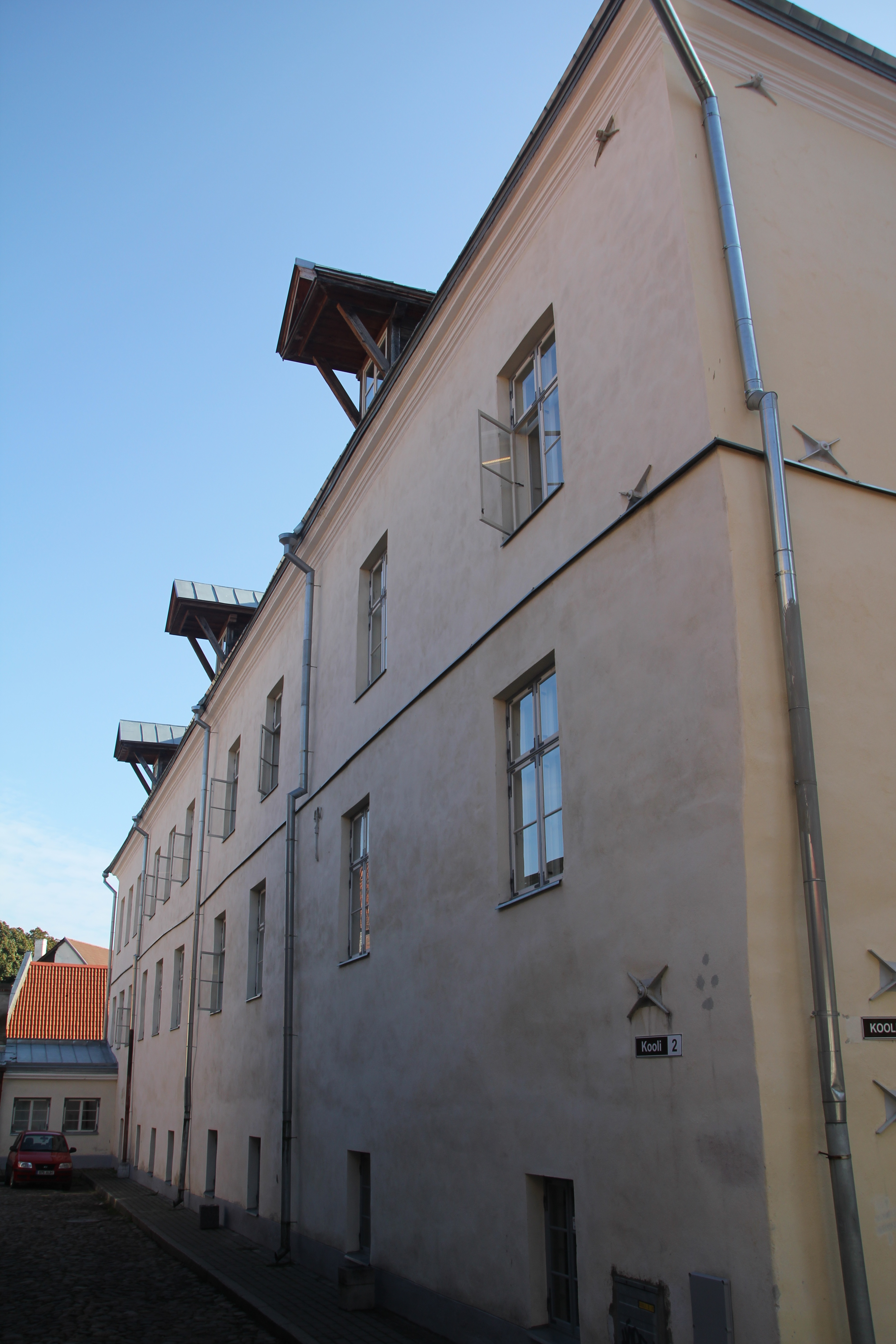 Maja, kus aastail 1633-1828 asus Tallinna esimene trükikoda